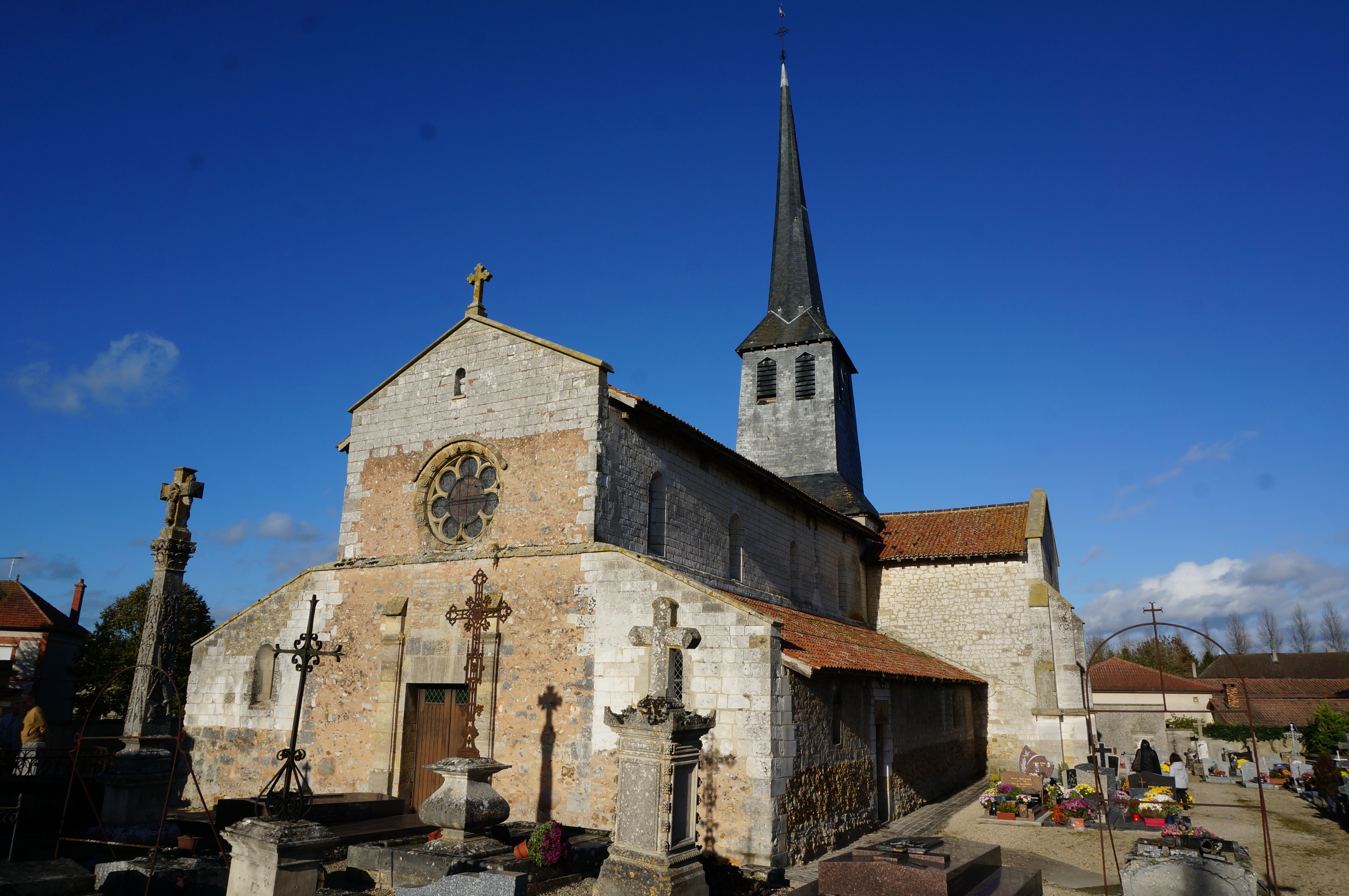 Vue de Songy.